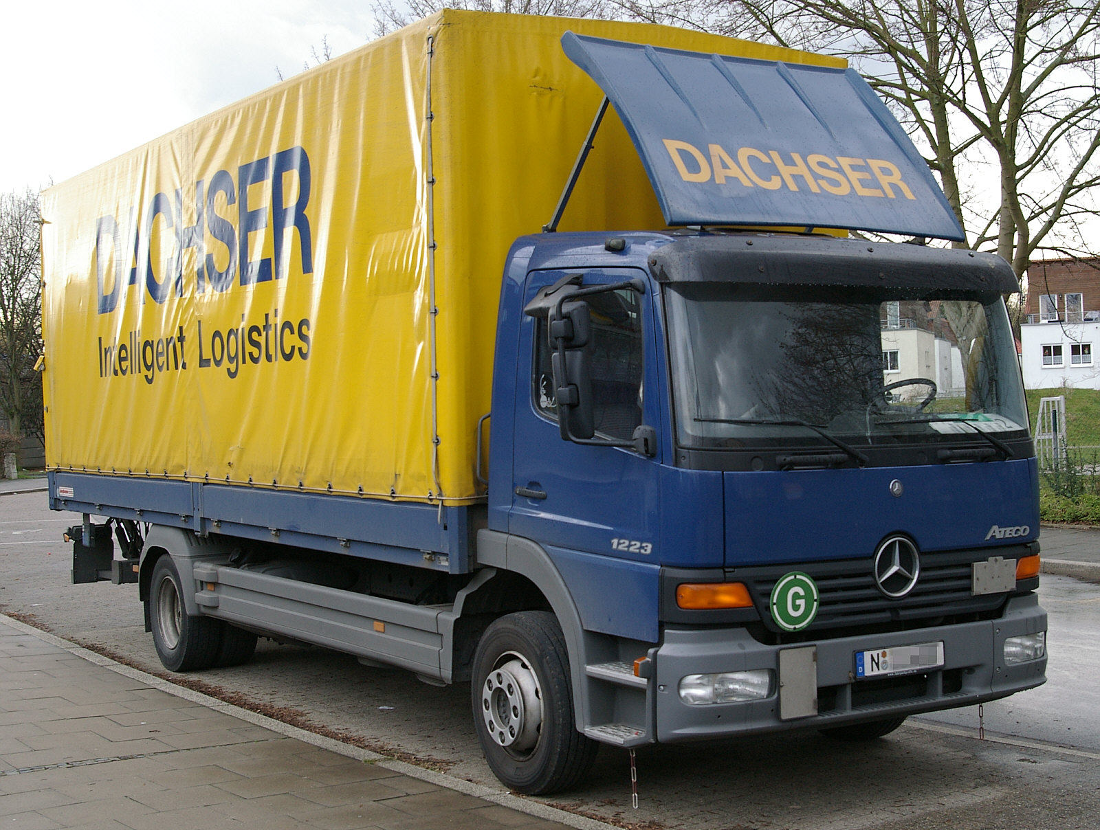 MB Atego 1223 der Spedition Dachser